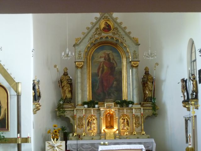 Pfarrkirche zum heiligen Georg in Wals - Altar